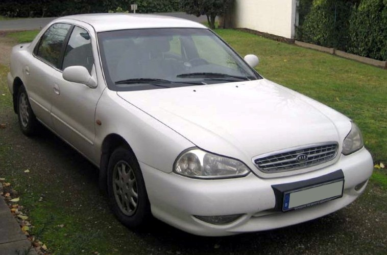 Kia Clarus 2.0 GLX - BJ2001 in Minden, Nordrhein-Westfalen.